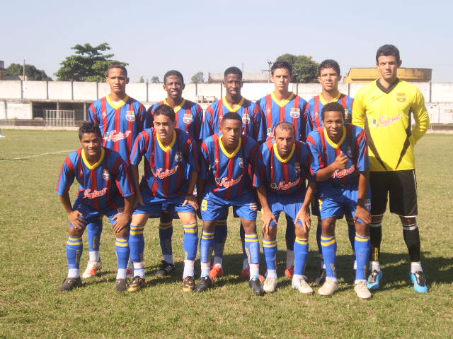 Equipe do Barcelona Esporte Clube, da Terceira Divisão do Rio de Janeiro, em 2009. Foto de Danielle Esperon